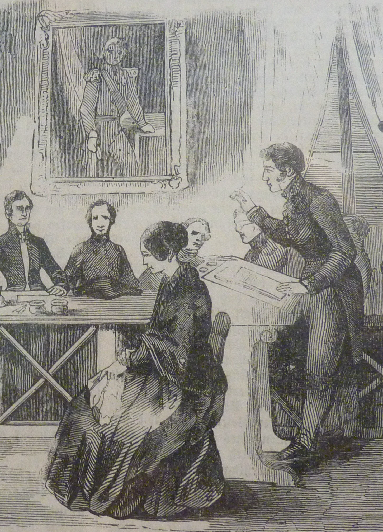 Christiane Ruthardt bei der Abschlussverhandlung am 20. Dezember 1844 vor dem Gericht in Esslingen